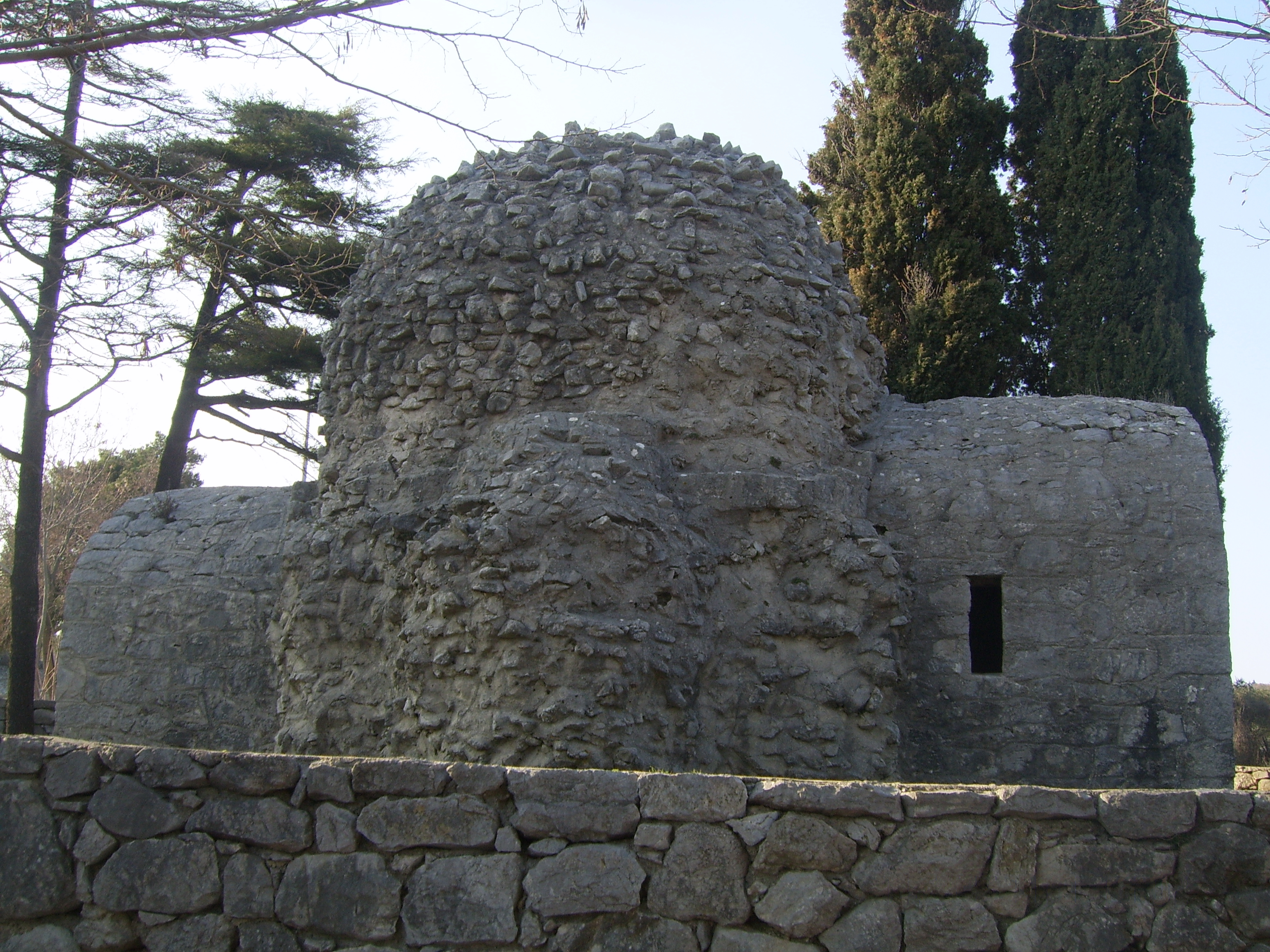 starohrvatska arhitektura, crkvica sveti Dunat kraj Punta na otoku Krku, 9. st.